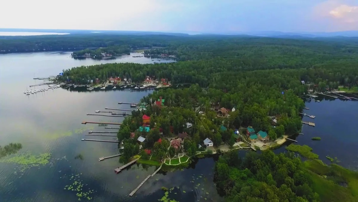 Вид на посёлок Сайма, с высоты птичьего полёта